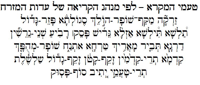 טעמי המקרא לפי מנהג הקריאה של עדות המזרח.Cantillation created by he:משתמש:נריה הרואה